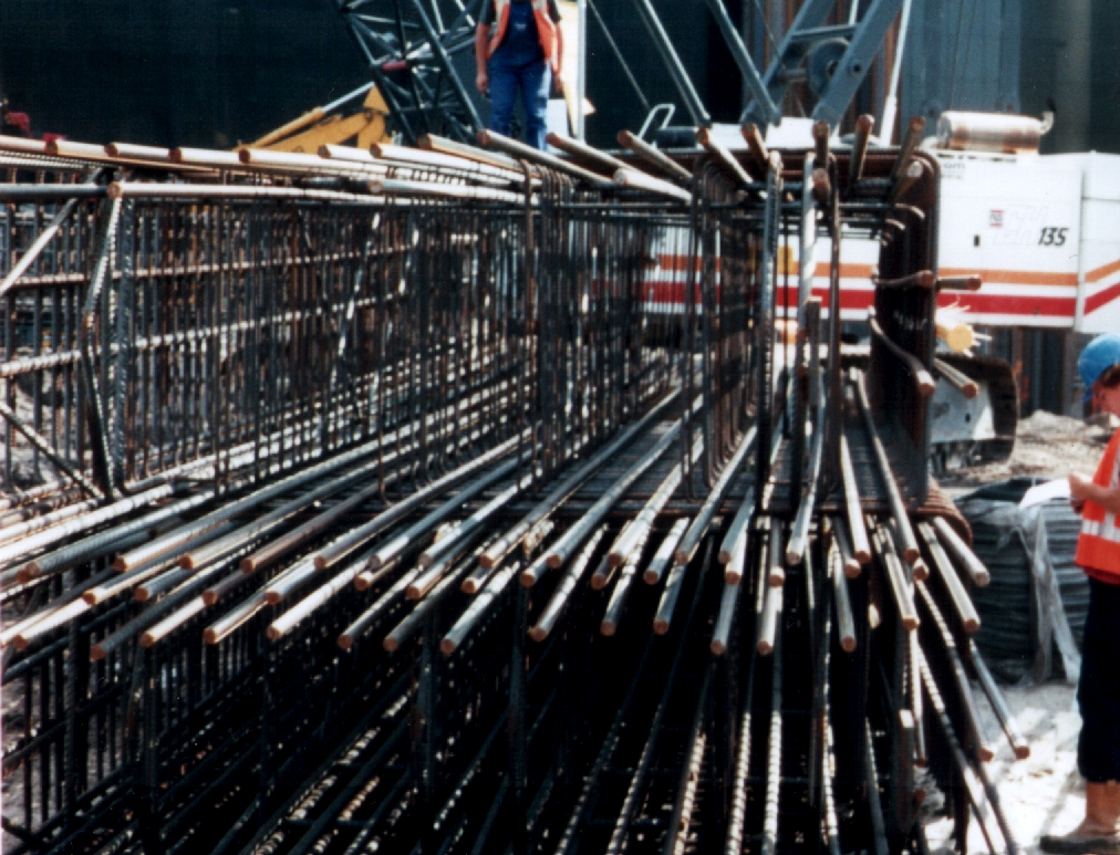 Reinforcement